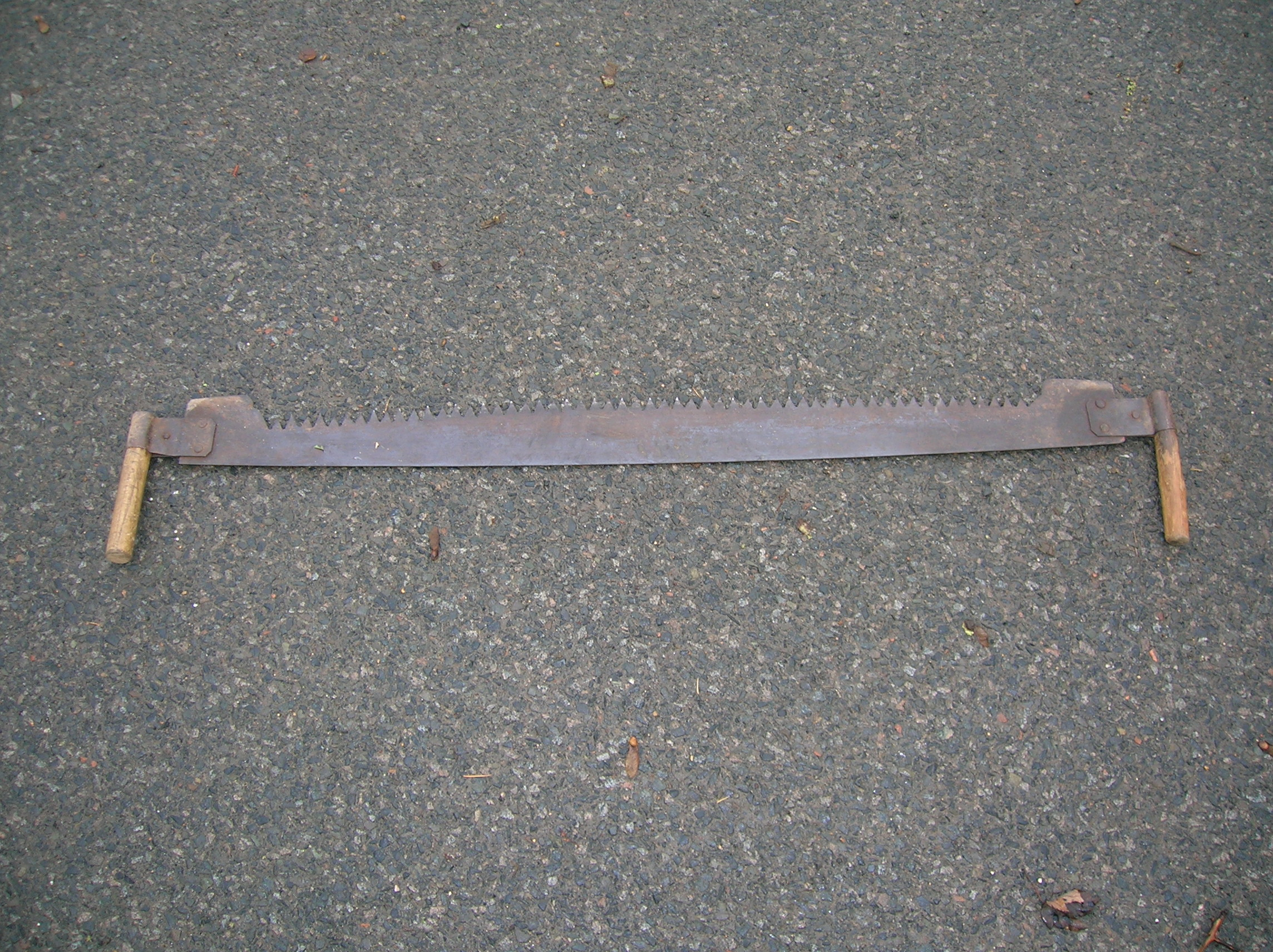 A two-man saw.